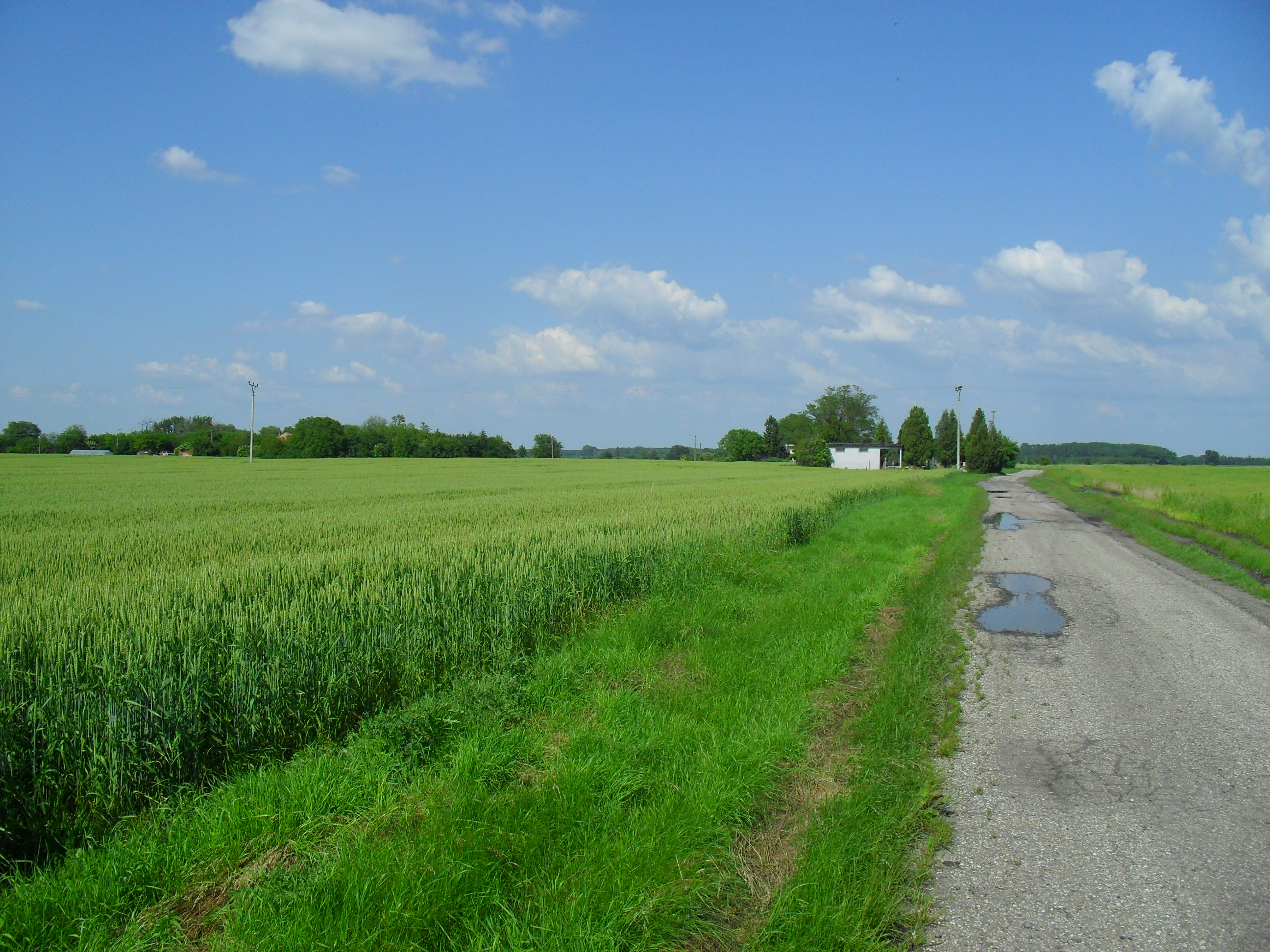 Megyercs/Violín - tájkép